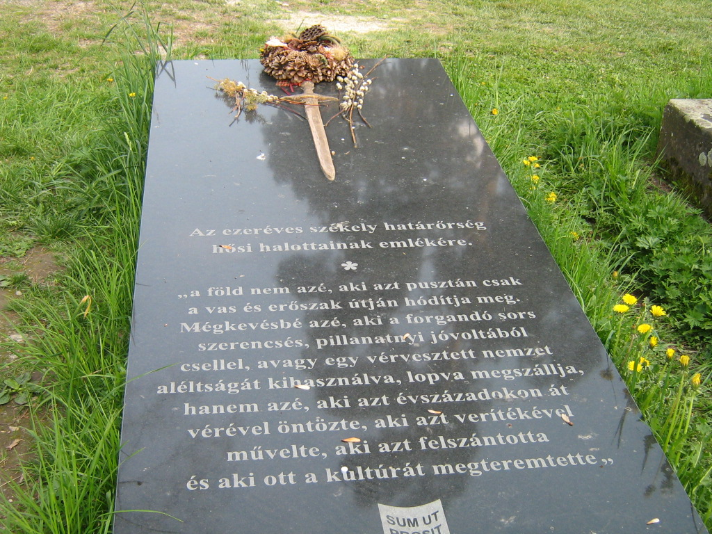 Az első és a második világháborúban elhunyt székelyek tiszteletére állított emlékmű a gyergyószentmiklósi temetőben